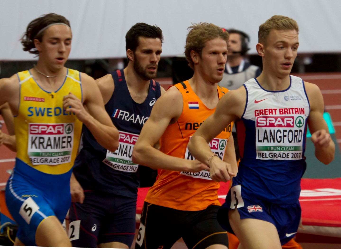 142 finale 800m